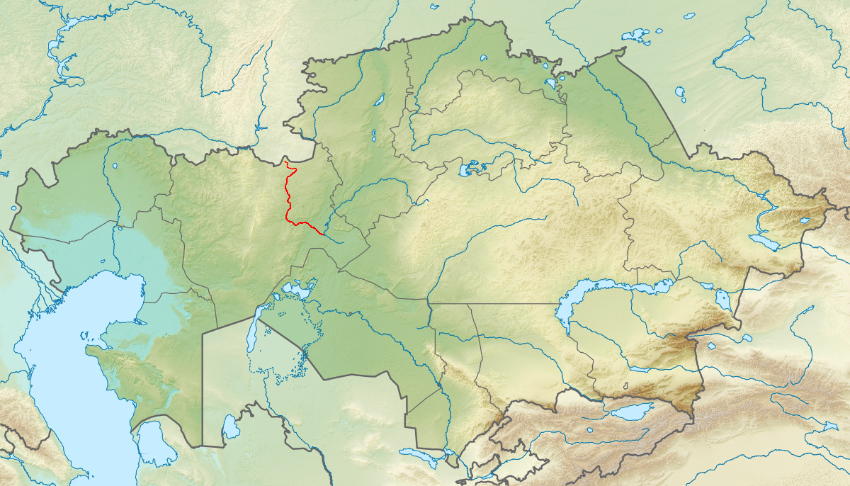 Річка Іргиз на мапі Казщахстану